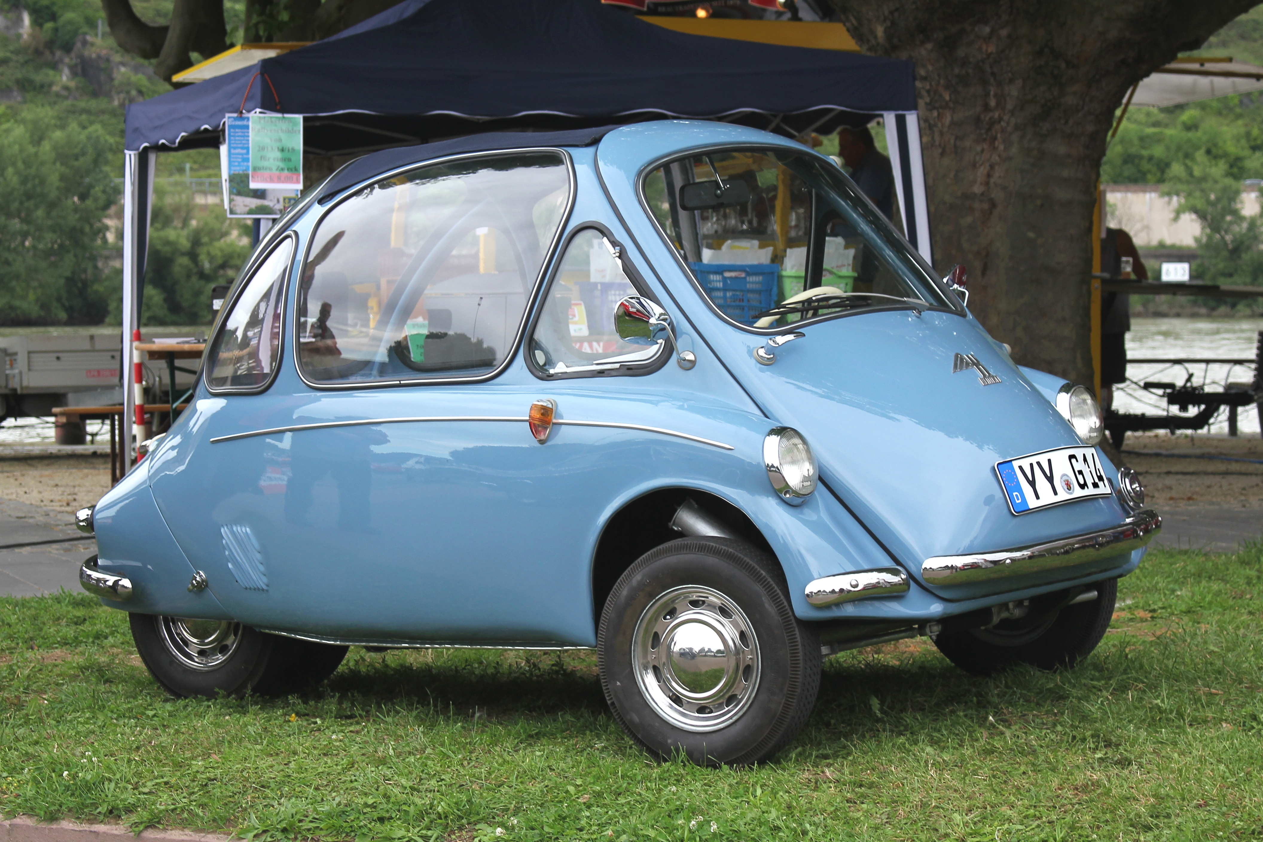 Heinkel Kabine 200, Typ 154, Baujahr 1957, 1-Zylinder-Viertaktmotor, 198 cm³; Ausführung mit 4 Rädern (fiktives Kennzeichen)